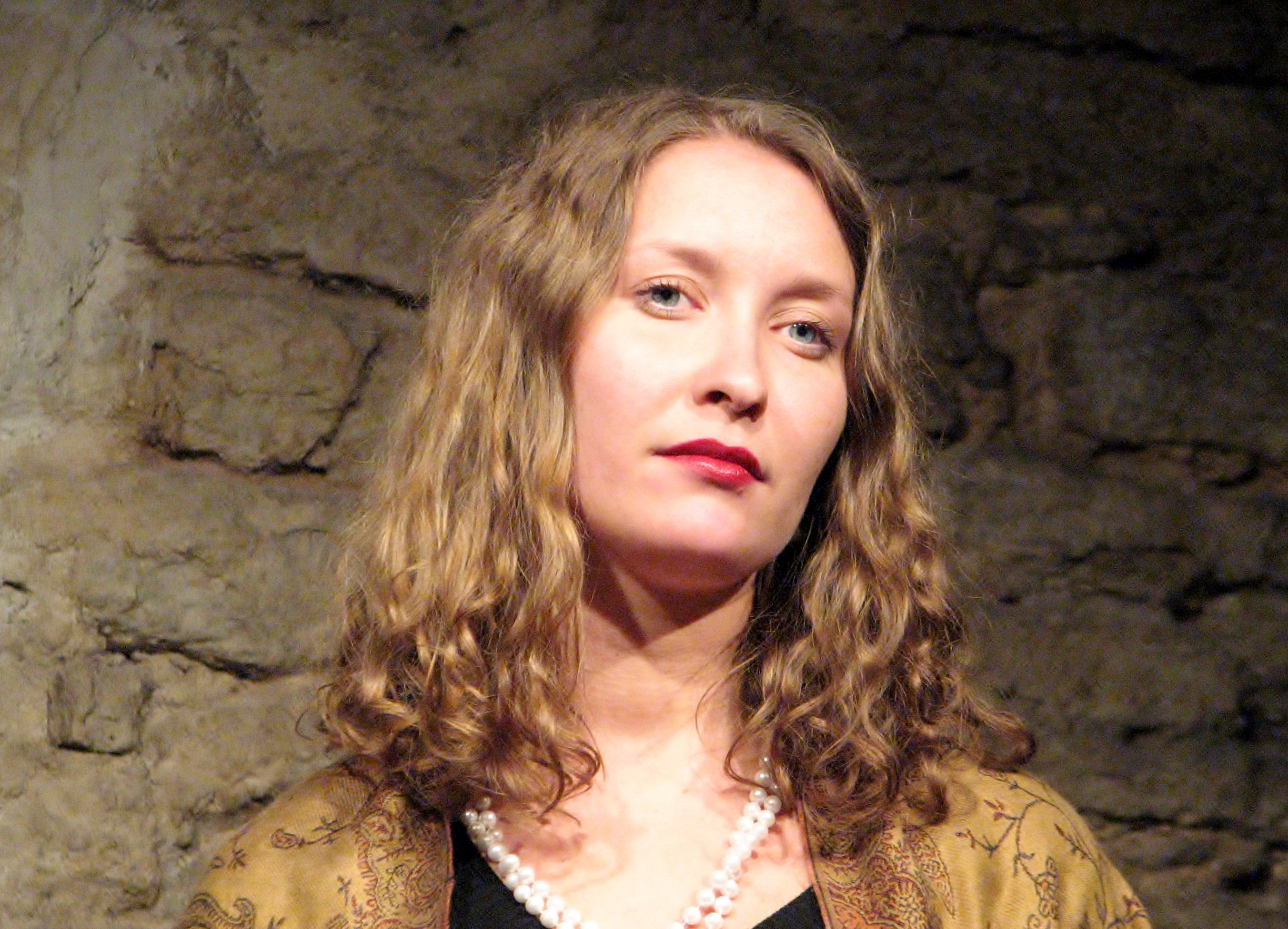 Eda Ahi esinemas Tallinna Poetry Slamil